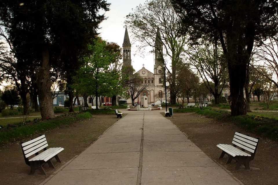 Parroquia San Lucas Evangelista, vista desde la plaza San Martín